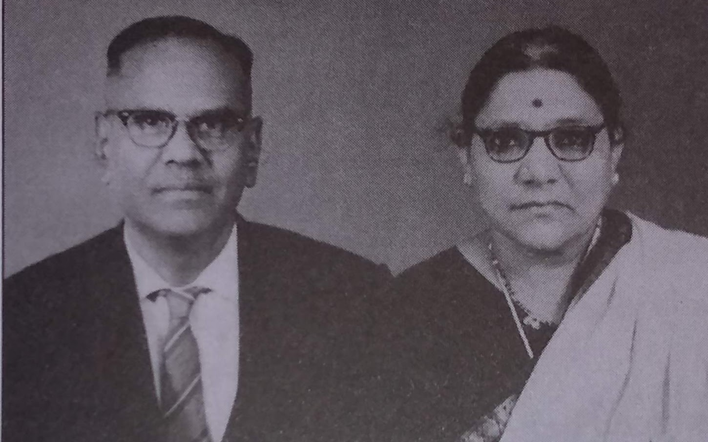 దువ్వూరి సుబ్బారావు గారి తండ్రి మల్లికార్జునరావు తల్లి సీతారామం